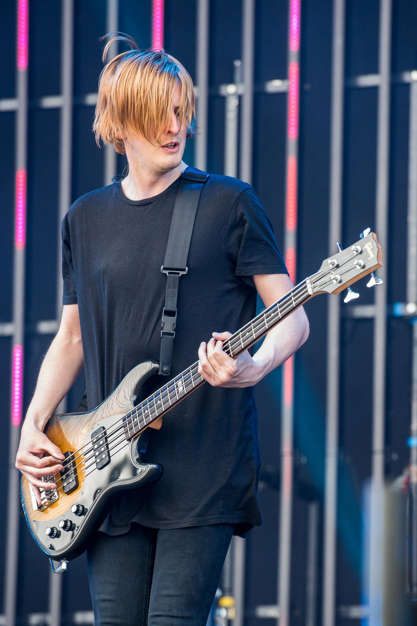 ARGO-Konzerte,Bring Me The Horizon,Festival,Konzert,Livekonzert,Livemusik,Matt Kean,Musik,RiP,Rock im Park 2016,Seat Zeppelin Stage